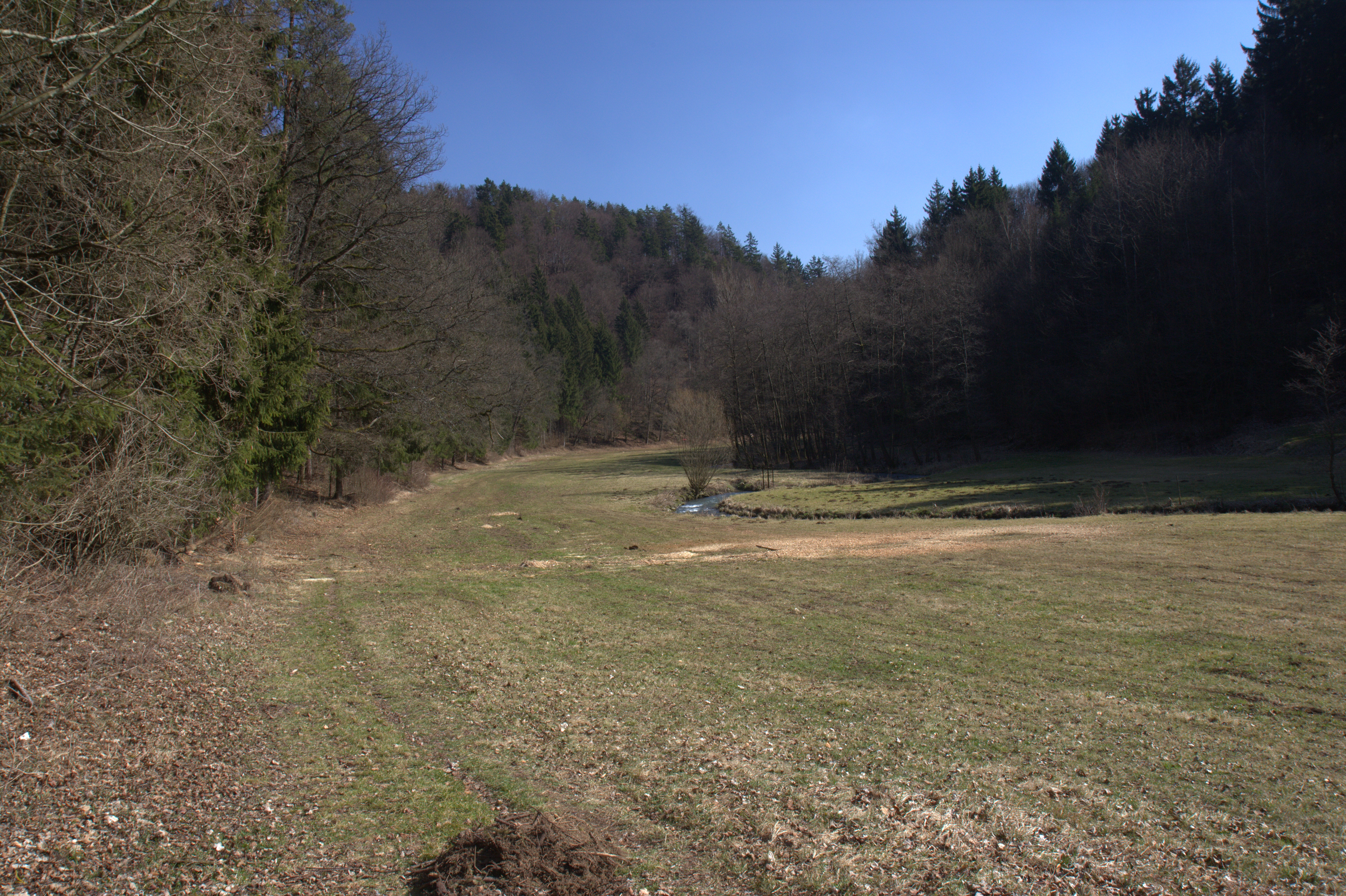 Burgstall Vestenberg - Ansicht des Burgberges über dem Ailsbachtal aus nördlicher Richtung